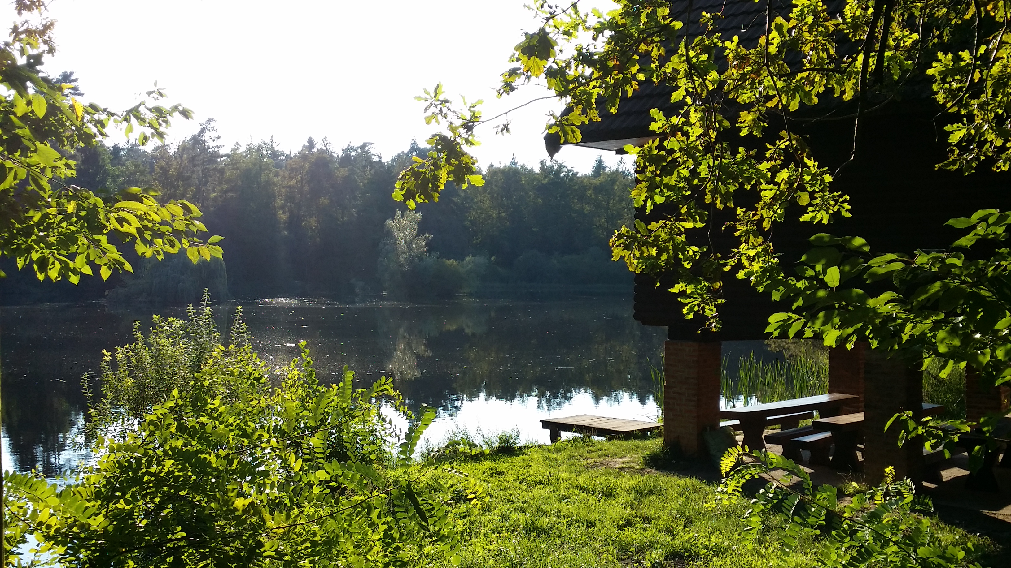 Ribnik v Partovcu (Pond Partovec)